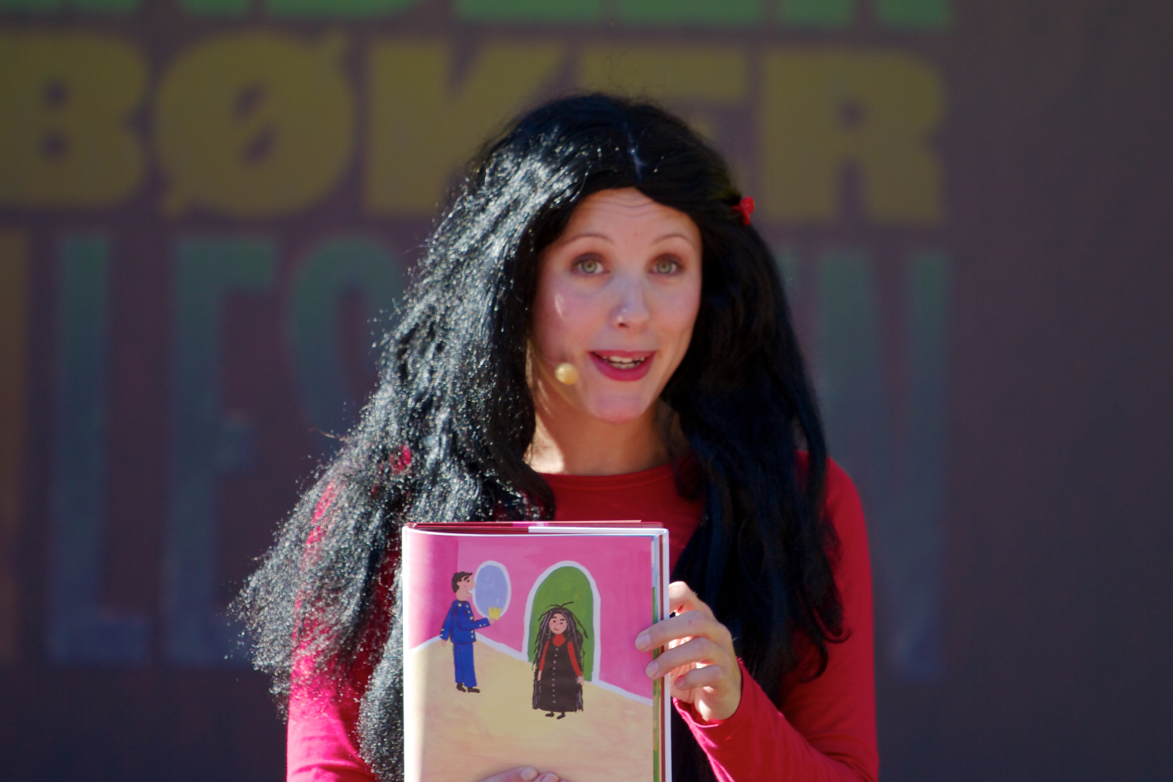 Karoline Øyan som Pulverheksa på Oslo bokfestival 2010.